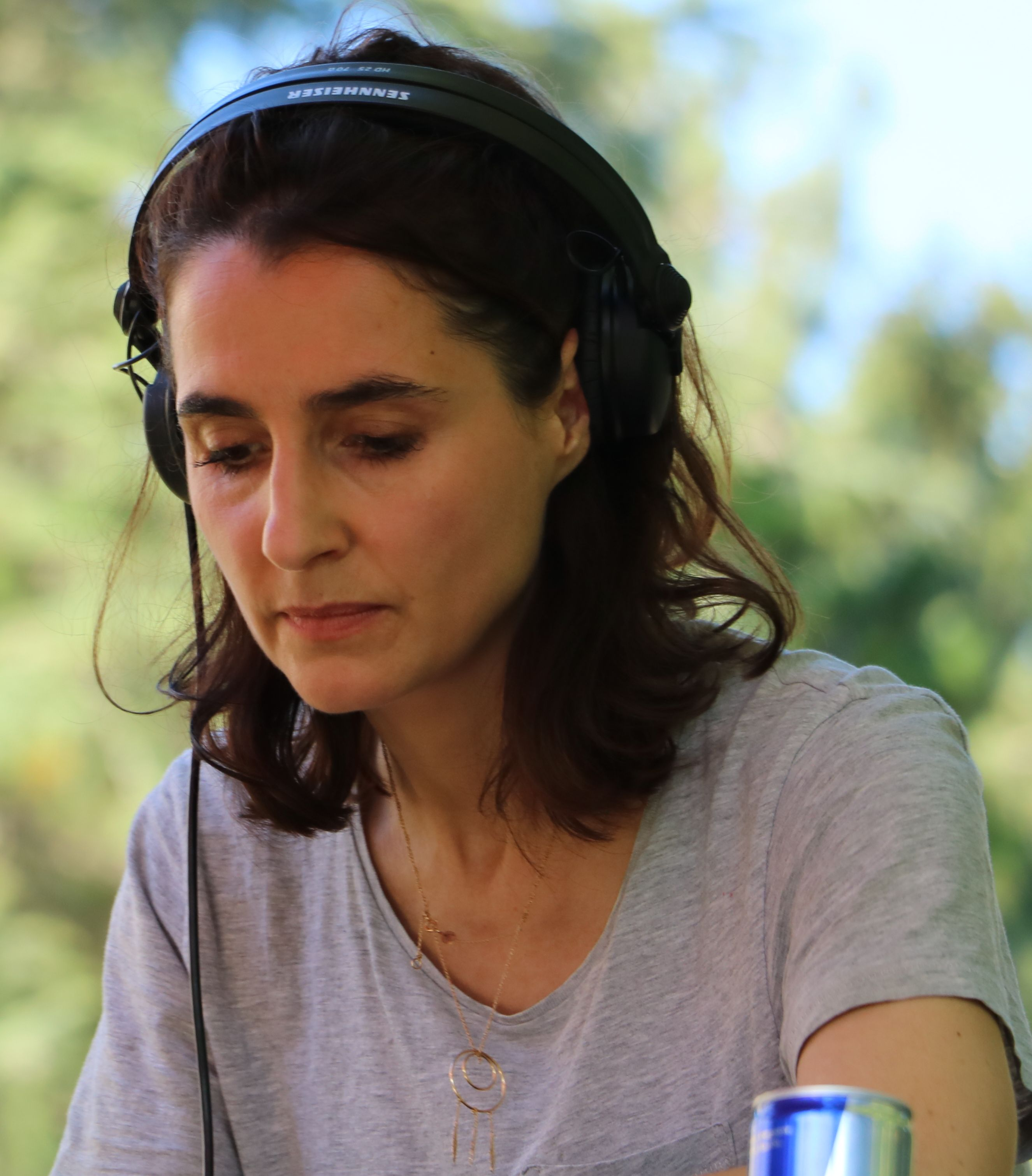 Maud Geffray, concert Scopitone, Nantes, 23 septembre 2017